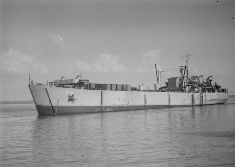 HMAS LST 3014